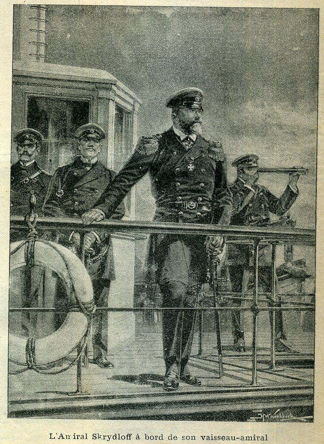 see picture